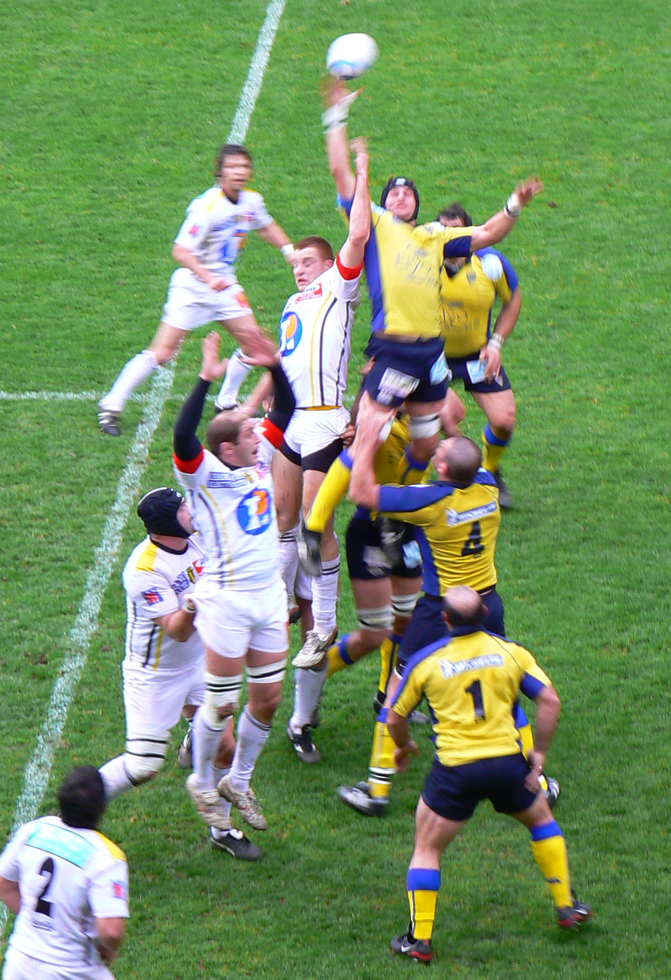 Une touche lors du match opposant le SC Albi à l'ASM Clermont Auvergne au stade Marcel Michelin de Clermont-Ferrand.